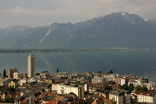 Montreux-Cité (Lac Léman)